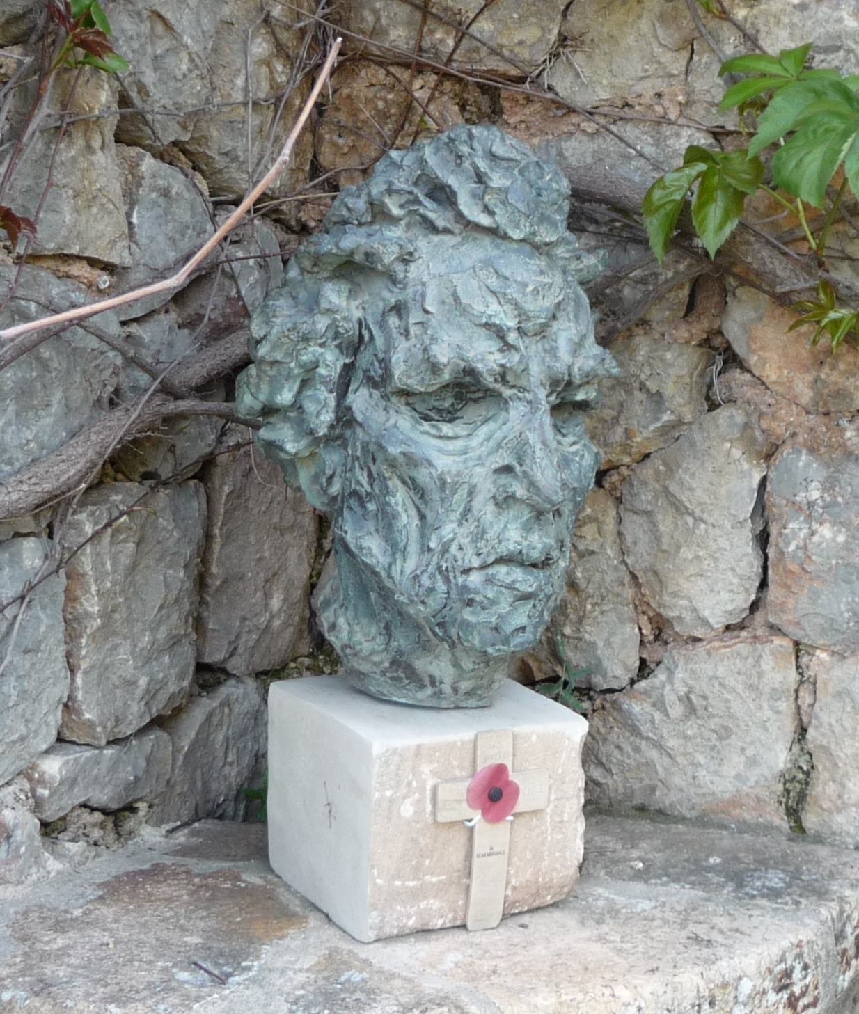 Bust of Robert von Ranke Graves placed in front of his house in Deia, Mallorca, Spain.